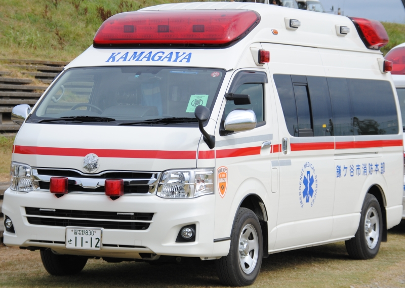 鎌ヶ谷市消防本部の救急車